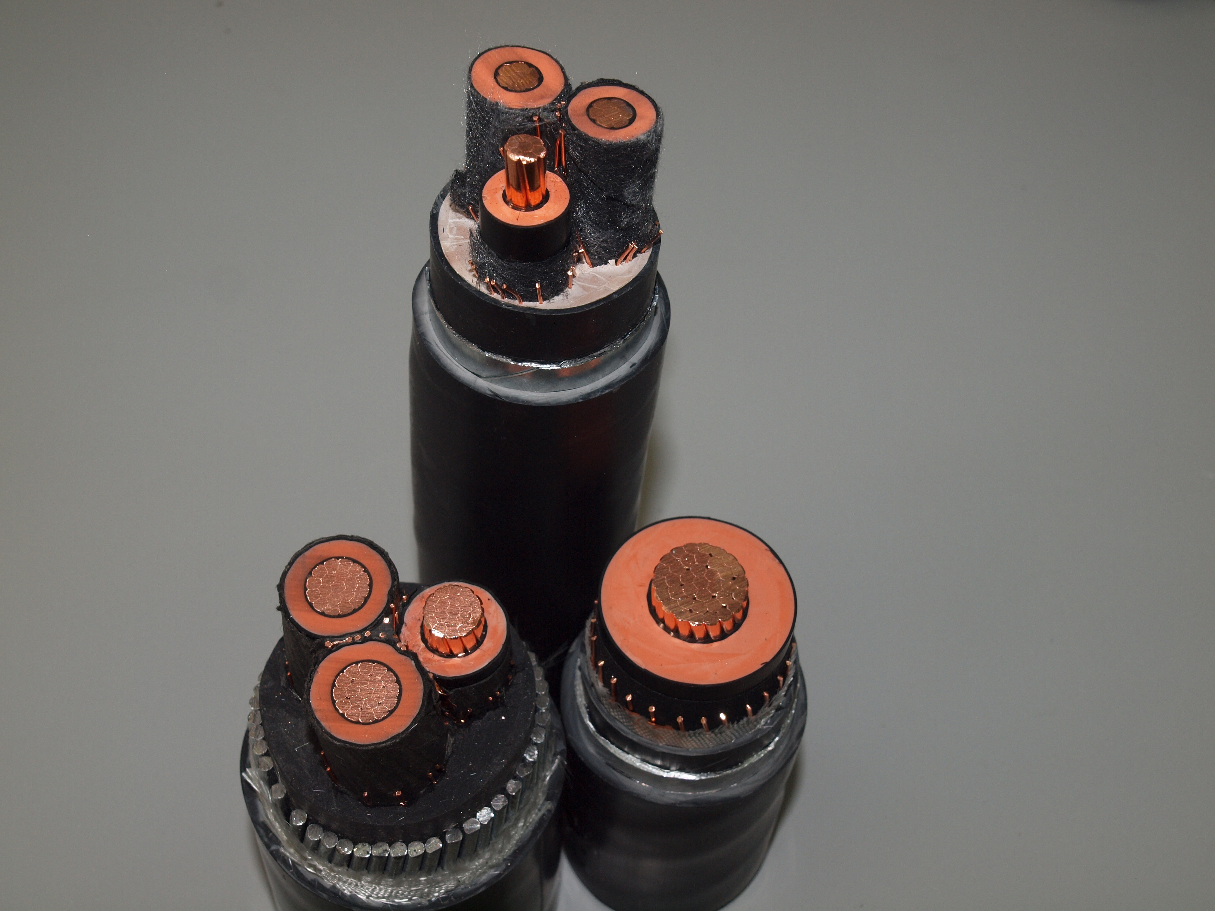 Силовой кабель